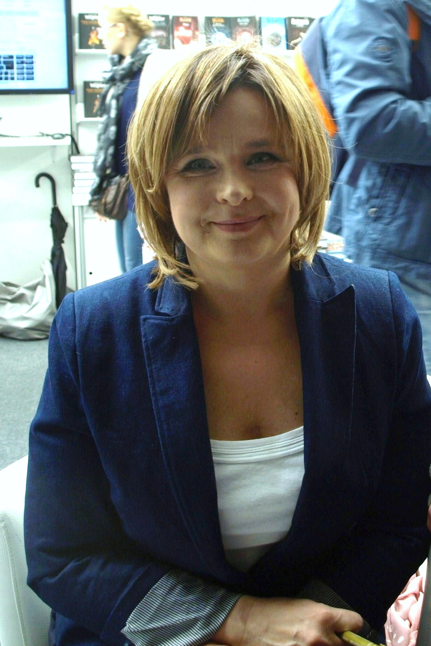 Aktorka Edyta Jungowska podczas Warszawskich Targów Książki w 2015 r.